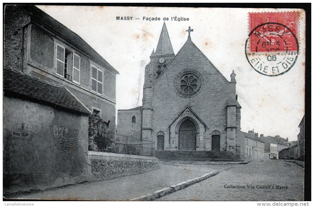 ancienne carte postale de l'église sainte marie madeleine de Massy